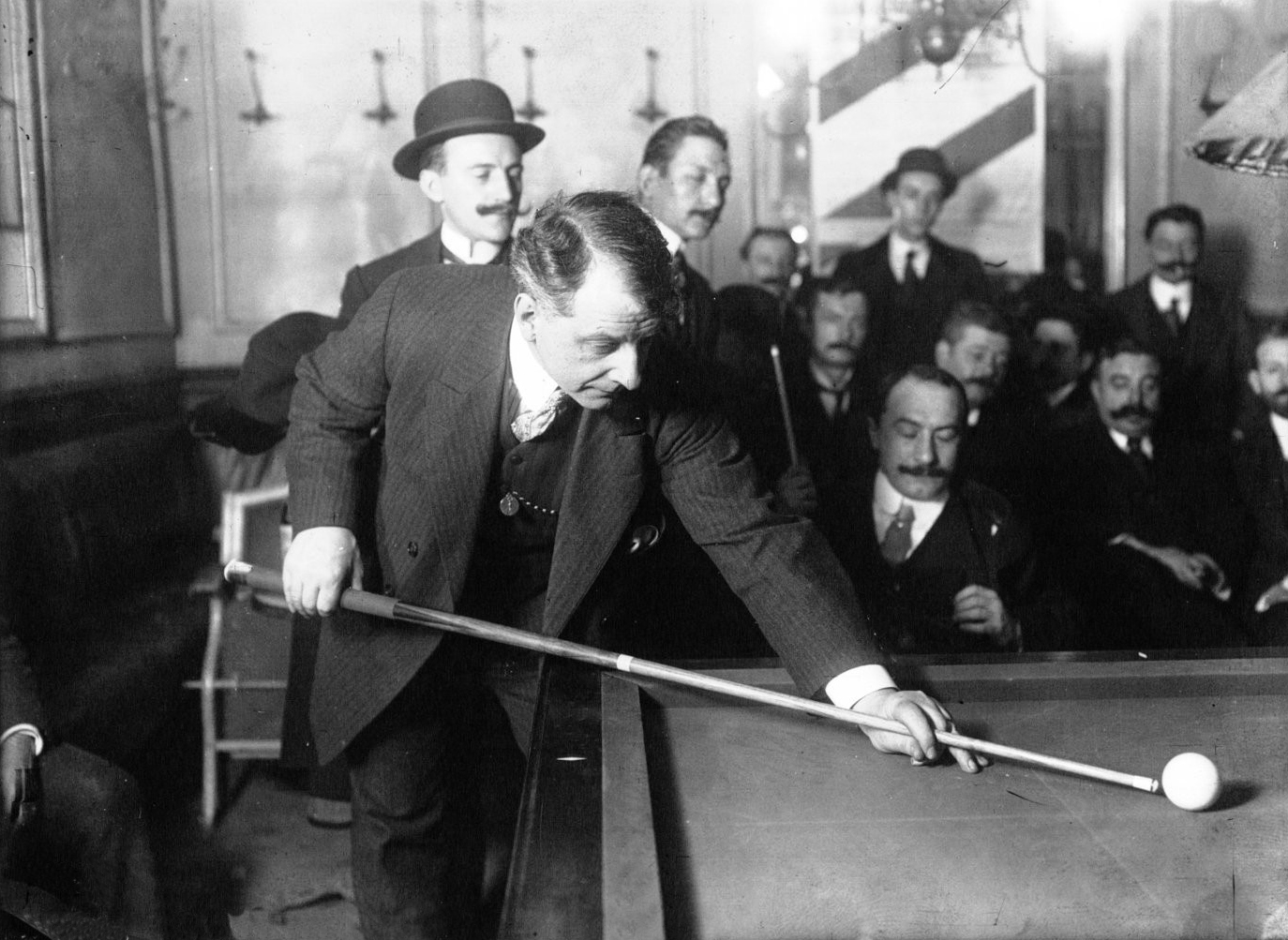 Charles Faroux bei der Cadre-45/2-Weltmeisterschaft 1912